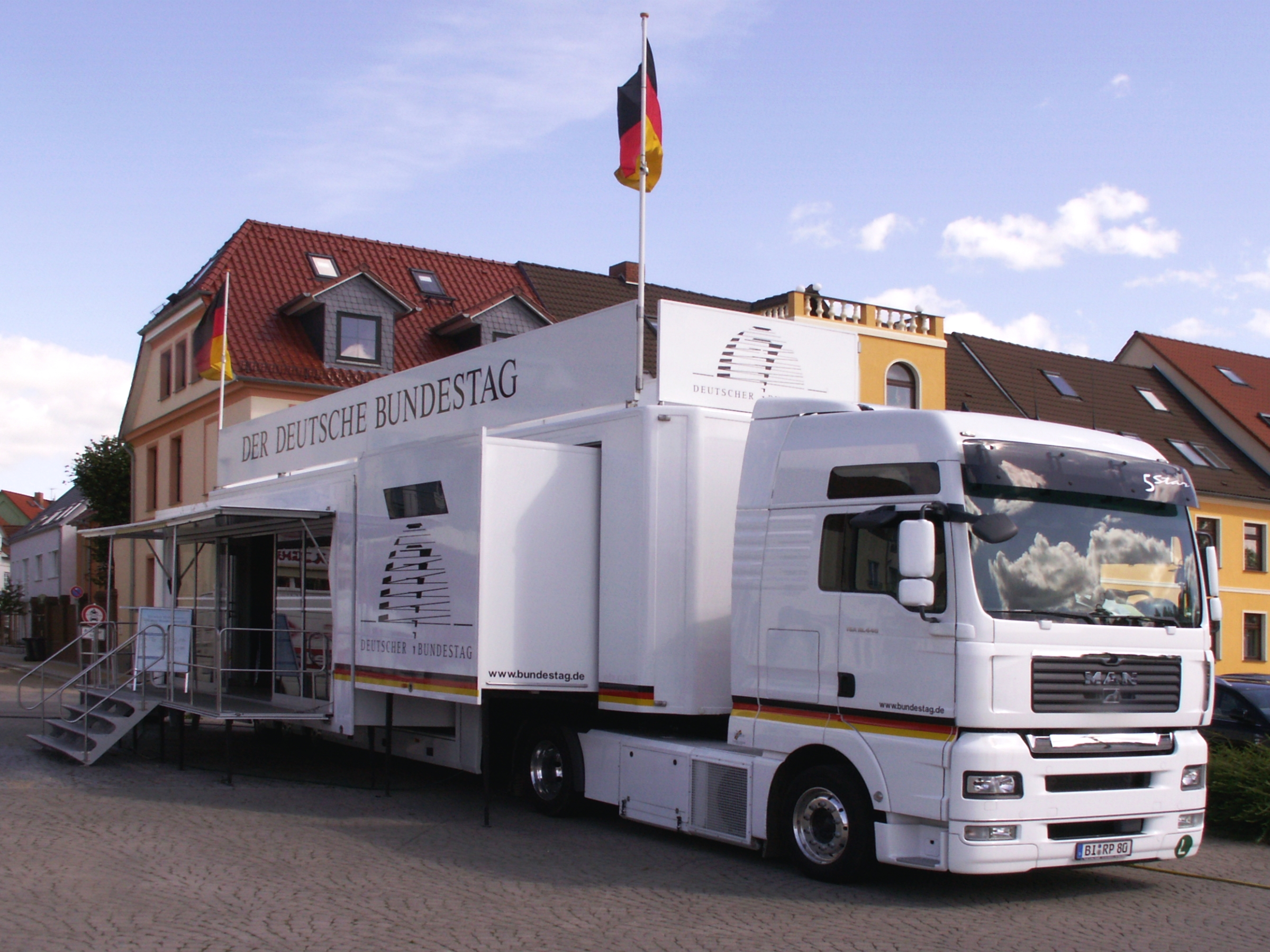 Das Infomobil des Deutschen Bundestages unterwegs in Waren an der Müritz - Foto 2007 Wolfgang Pehlemann Steinberg Ostsee PICT0408